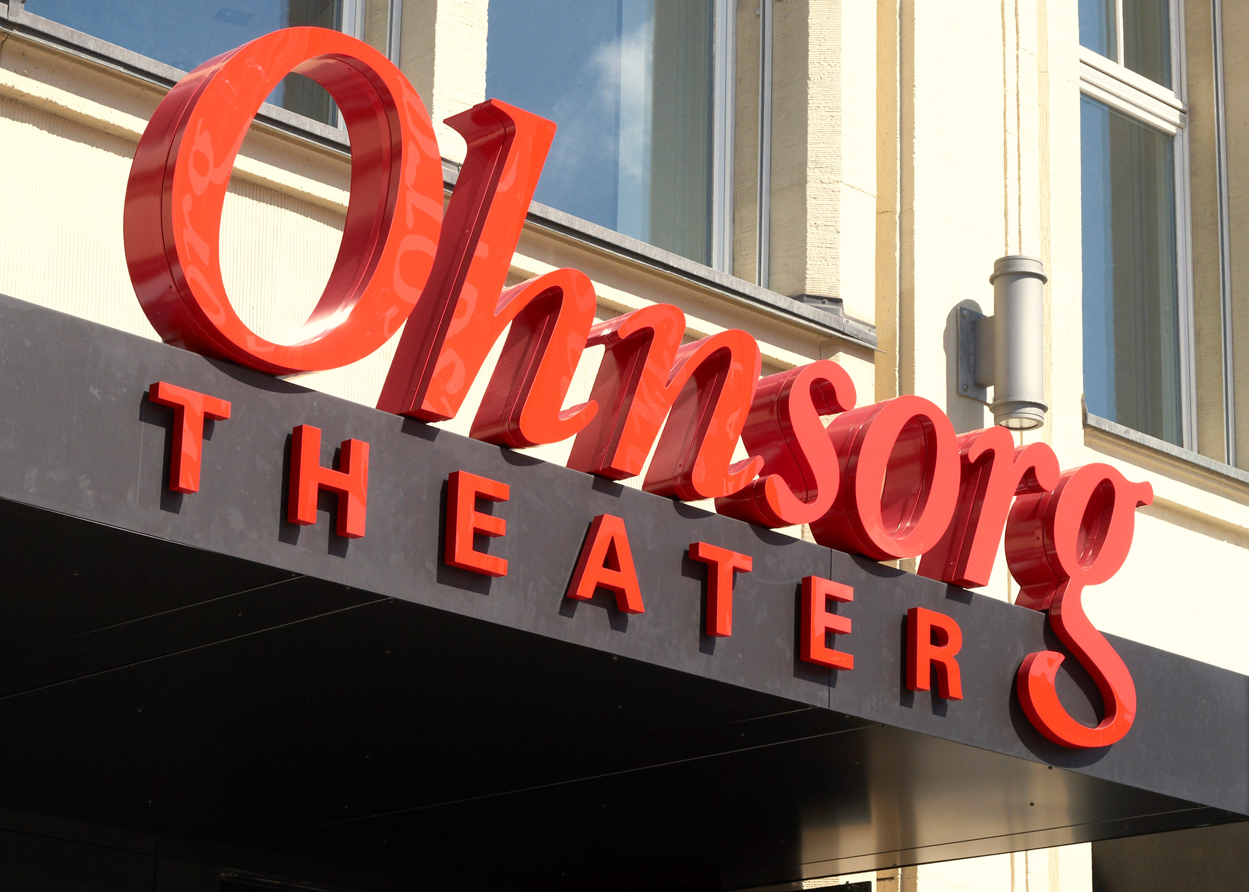 Eingangsbereich des neuen Ohnsorg-Theaters